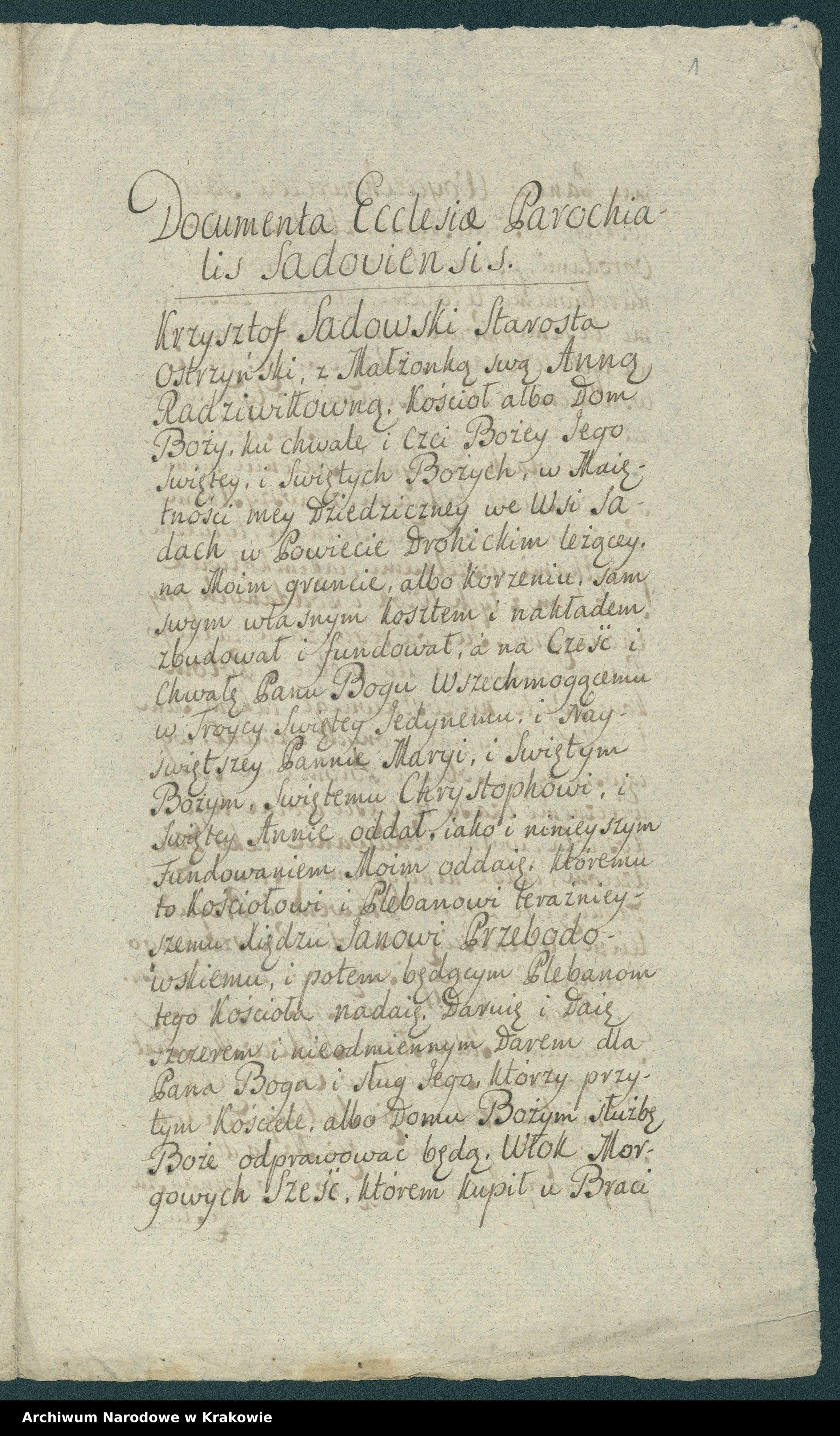 Документ второй половины XVI века.